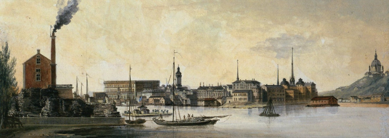 Vy från Kungsholmen mot Stockholm med Eldkvarn till vänster